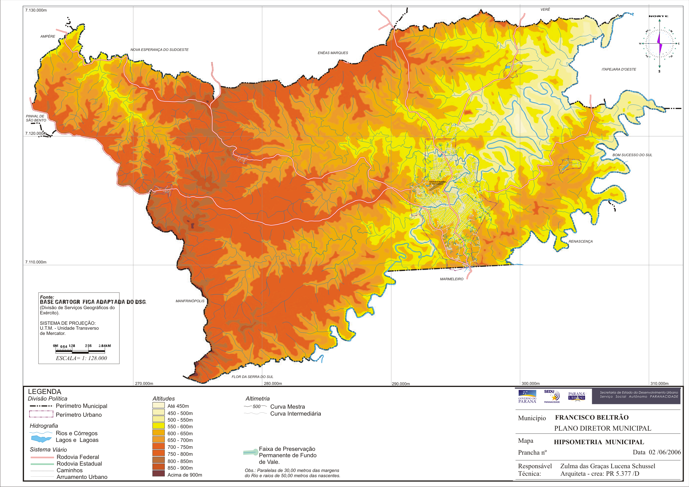 Mapa físico de Francisco Beltrão - PR